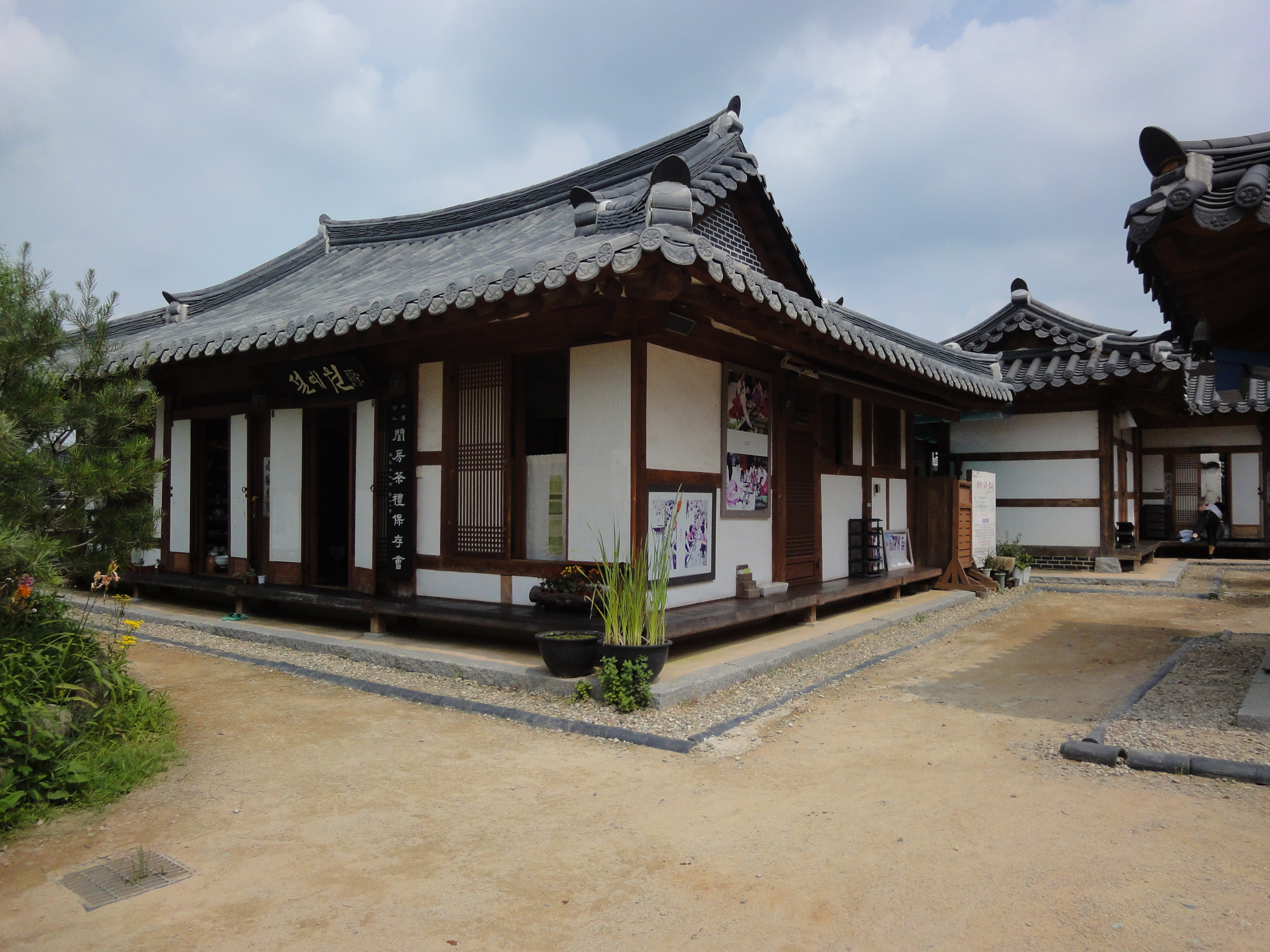 전주한옥마을의 전경.